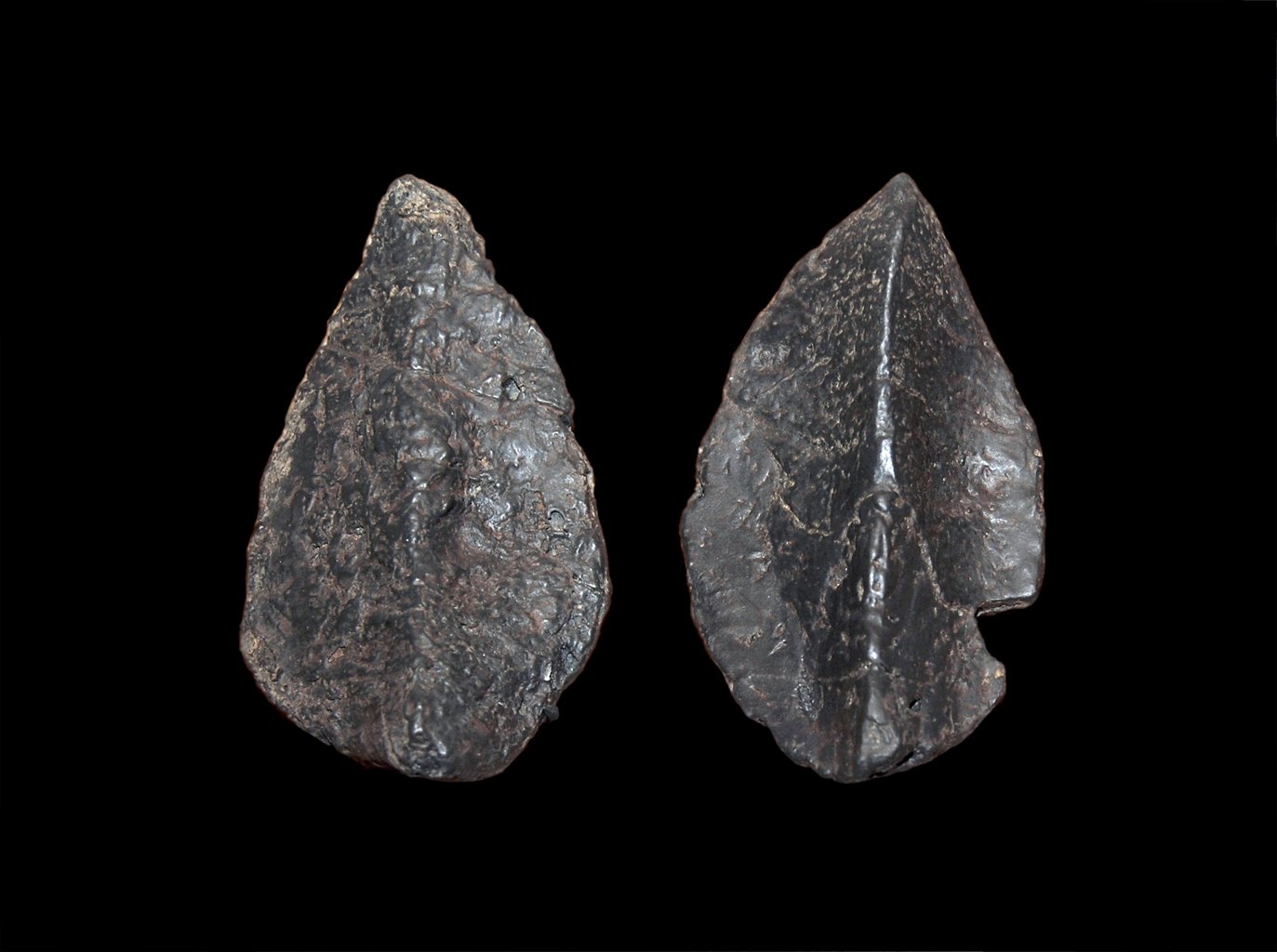 Struthiosaurus austriacus osteoderms, Naturhistorisches Museum Wien